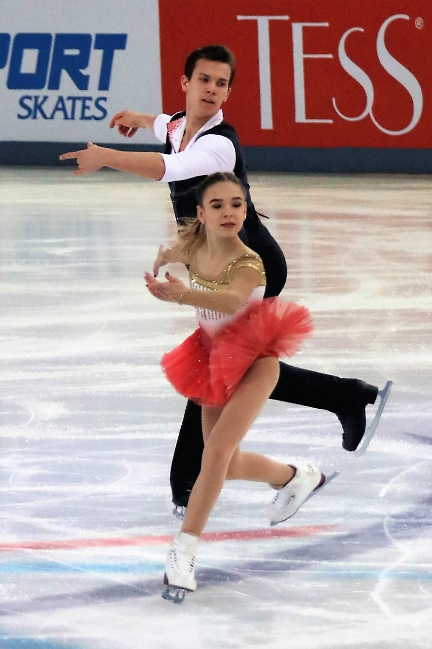 Ксения Ахантьева / Валерий Колесов на чемпионате России по фигурному катанию на коньках 2019